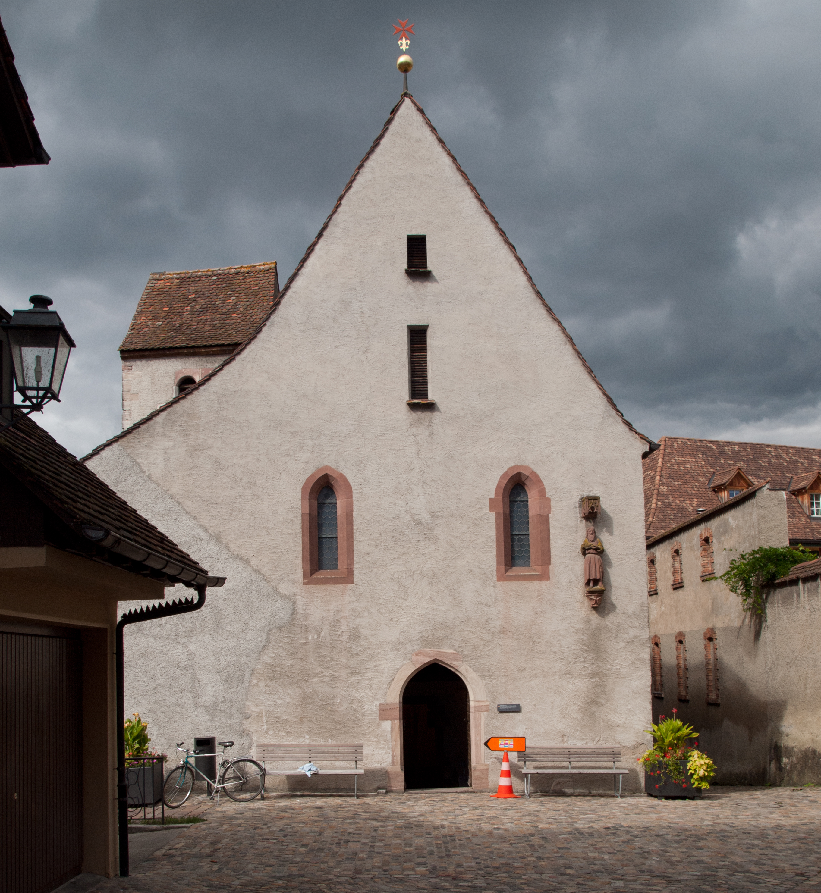 Die Johanniterkapelle in Rheinfelden AG. Sicht auf die Südseite (von der Marktgasse aus gesehen). Adresse: Johannitergasse 70